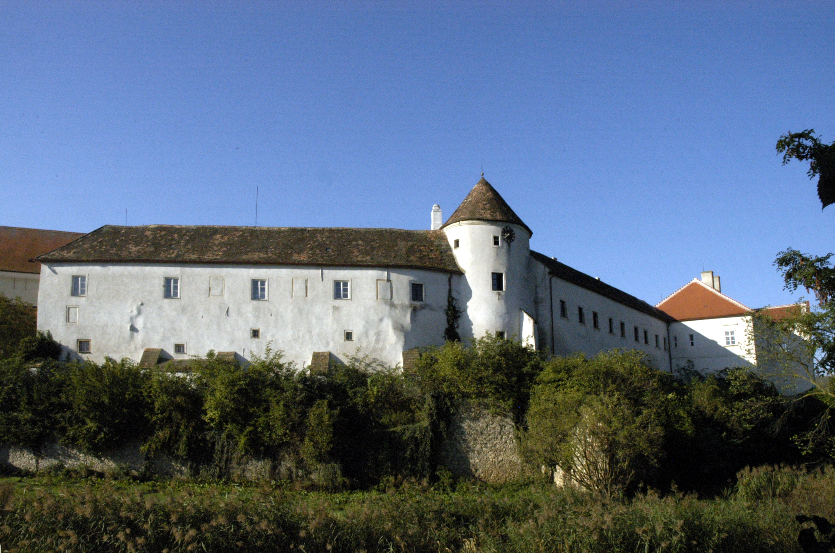 Schloss Mailberg, Grabenanlage und Nordosttrakt